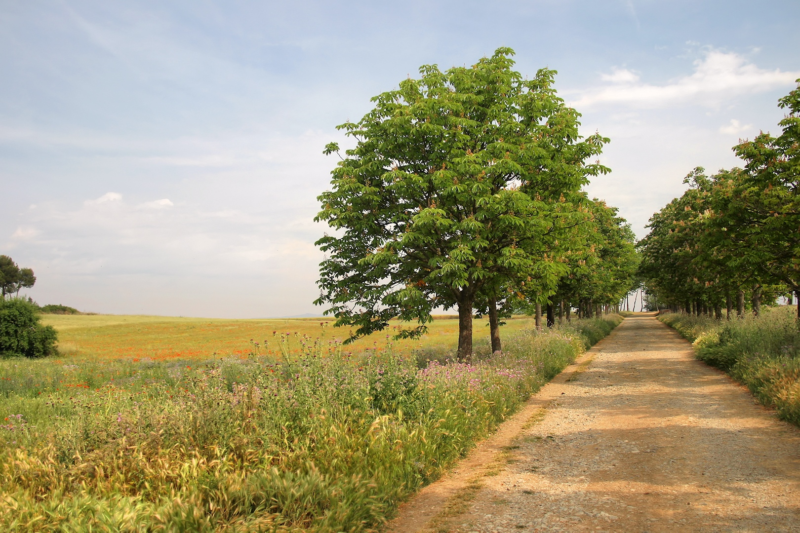 Parc de Gallecs